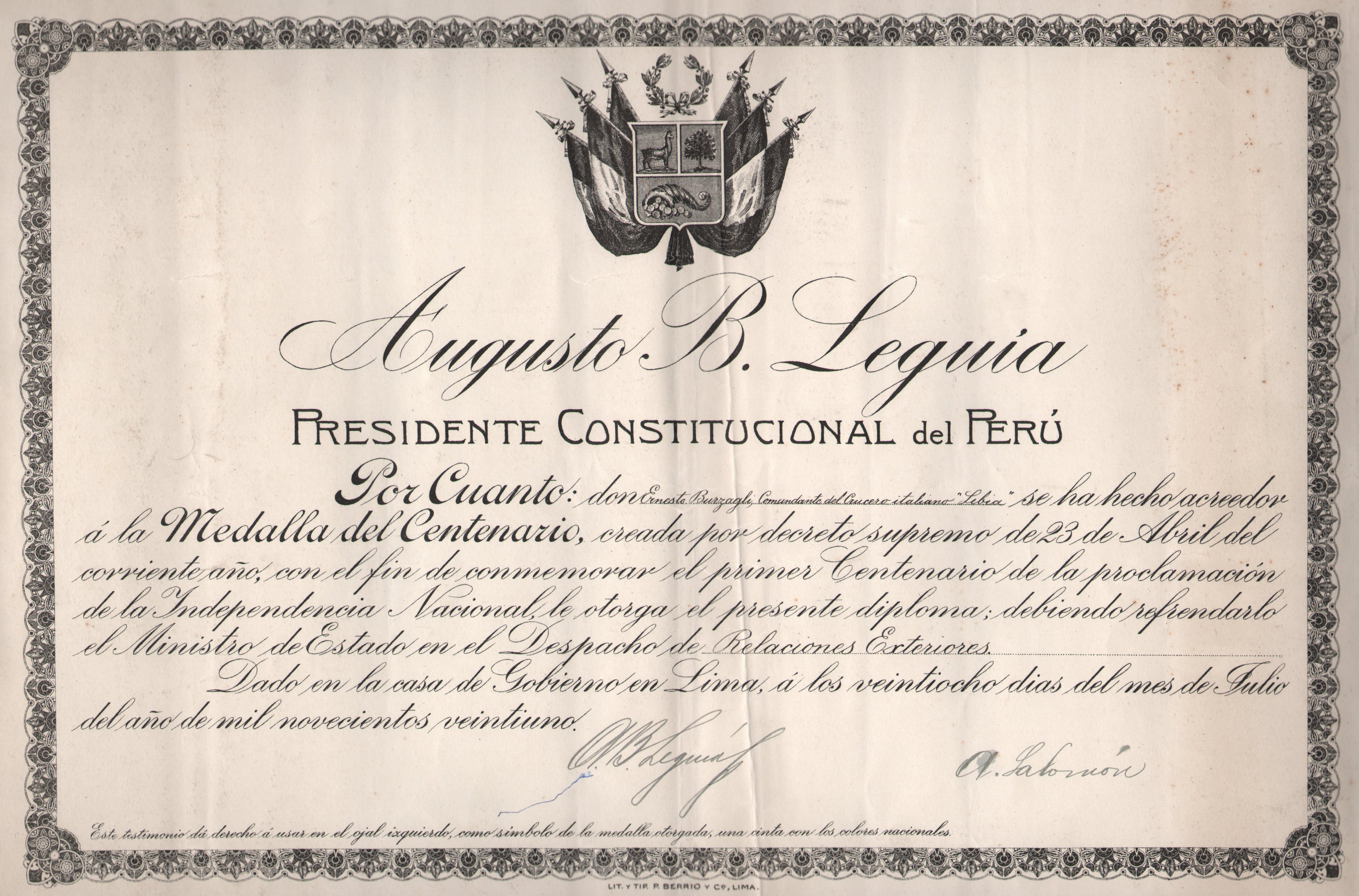 Award "medalla del Centenario"